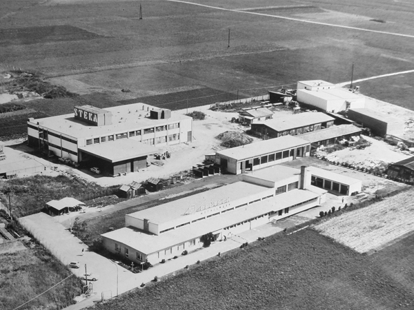 Das Areal der Steka-Werke und der Metallwerke Deutsch in Innsbruck, Tirol, um 1962